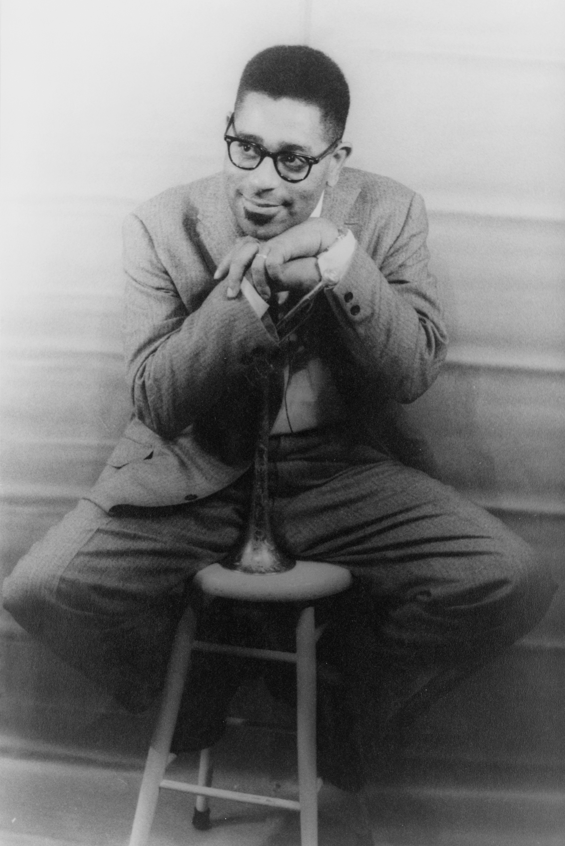 Dizzy Gillespie, 2 December 1955